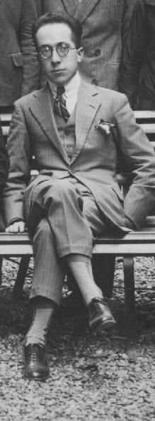 Mario Untersteiner al Liceo Ginnasio Giovanni Berchet. Ritratto fotografico del 25 maggio 1927 Licensing Untersteiner, Mario